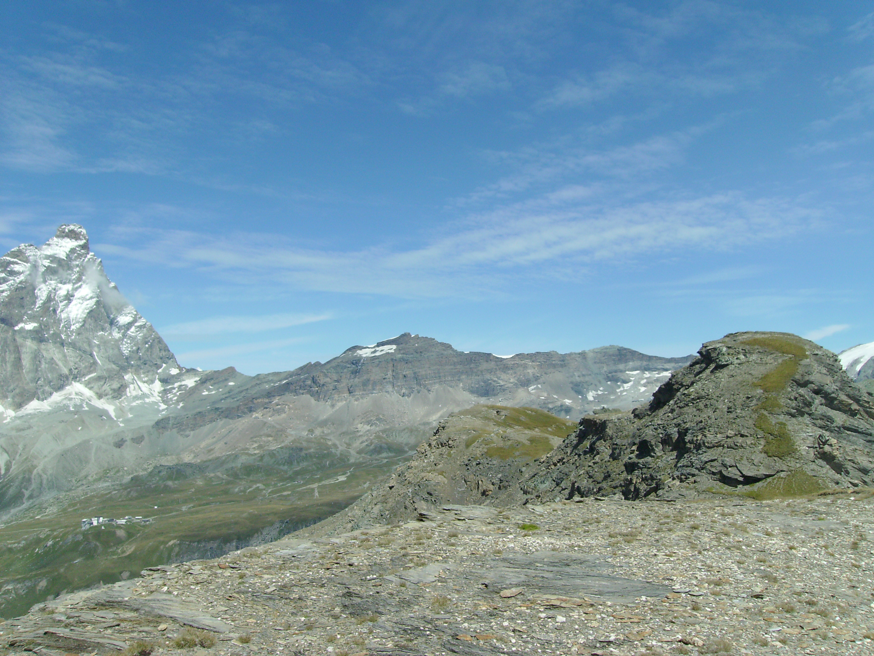 La cresta della Motta di Pleté